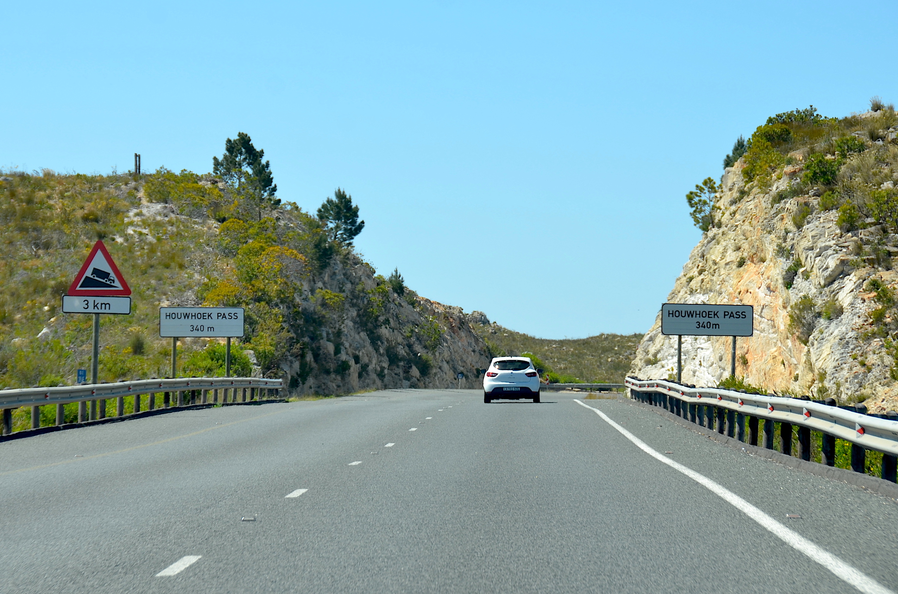 Houwhoek Pass bei Botrivier in Südafrika